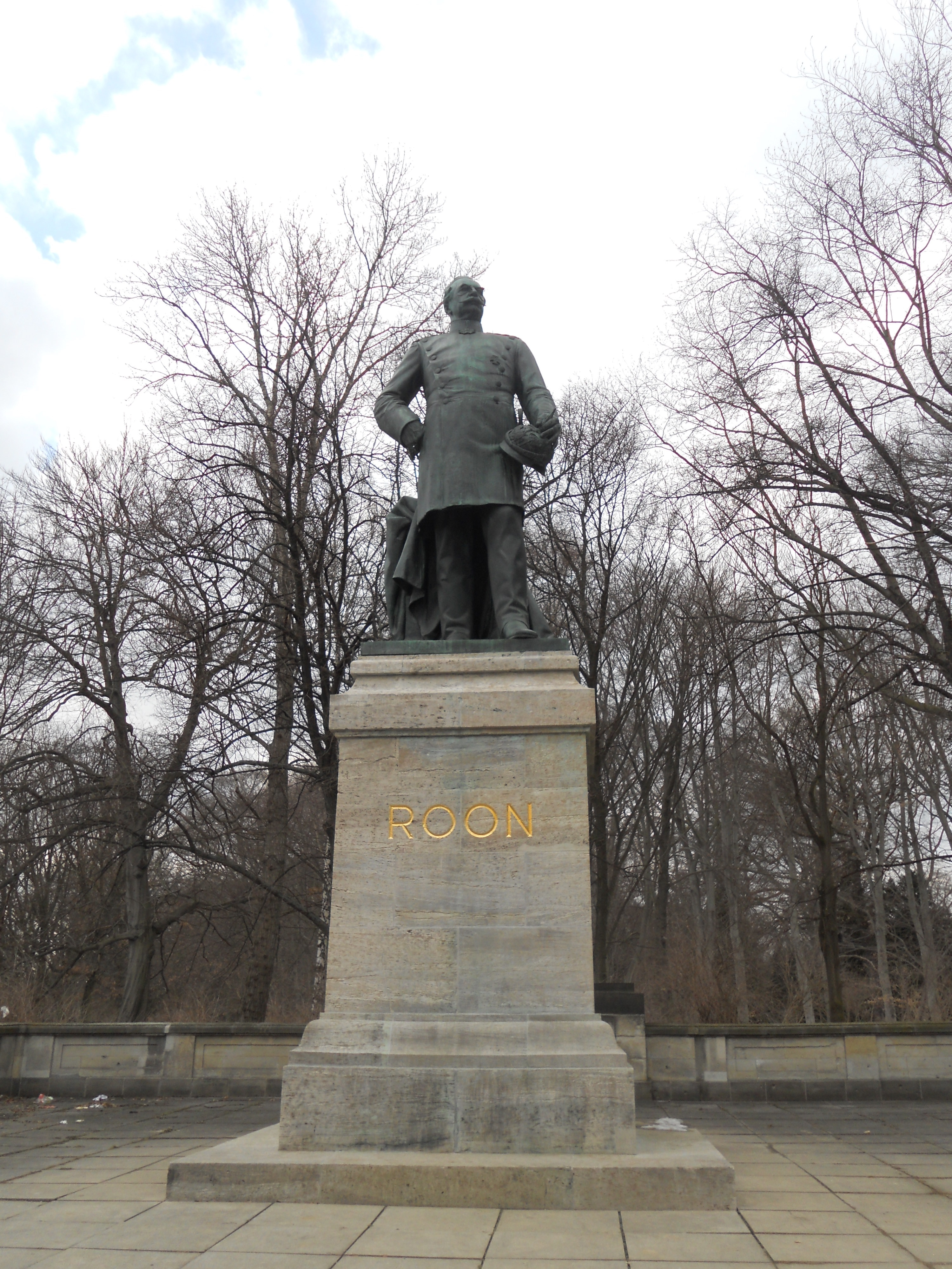 Denkmal des preußischen Generalfeldmarschalls Albrecht von Roon am Großen Stern im Großen Tiergarten in Berlin-Mitte